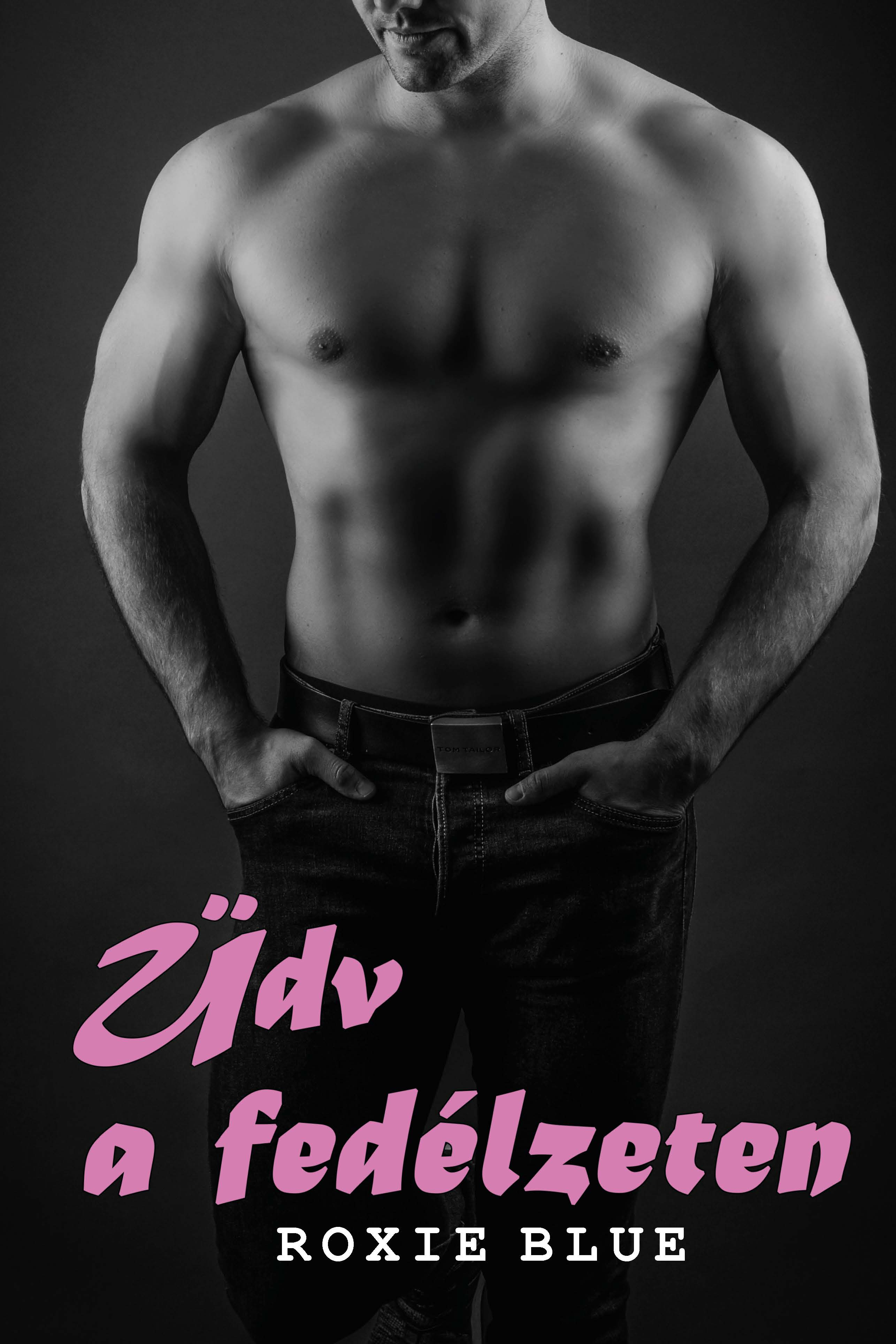 Roxie Blue Üdv a fedélzeten című könyvének borítója.